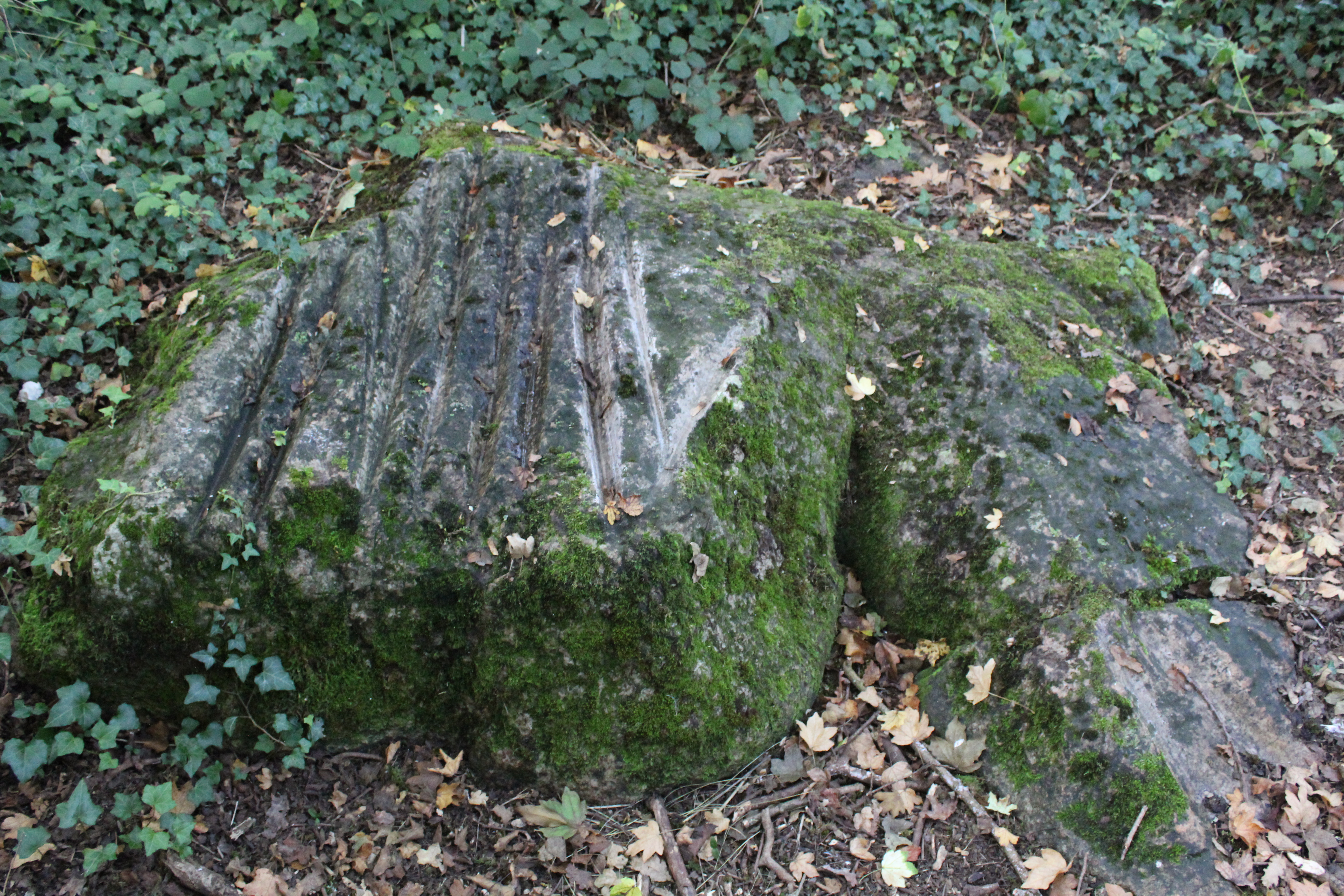 Polissoir préhistorique .